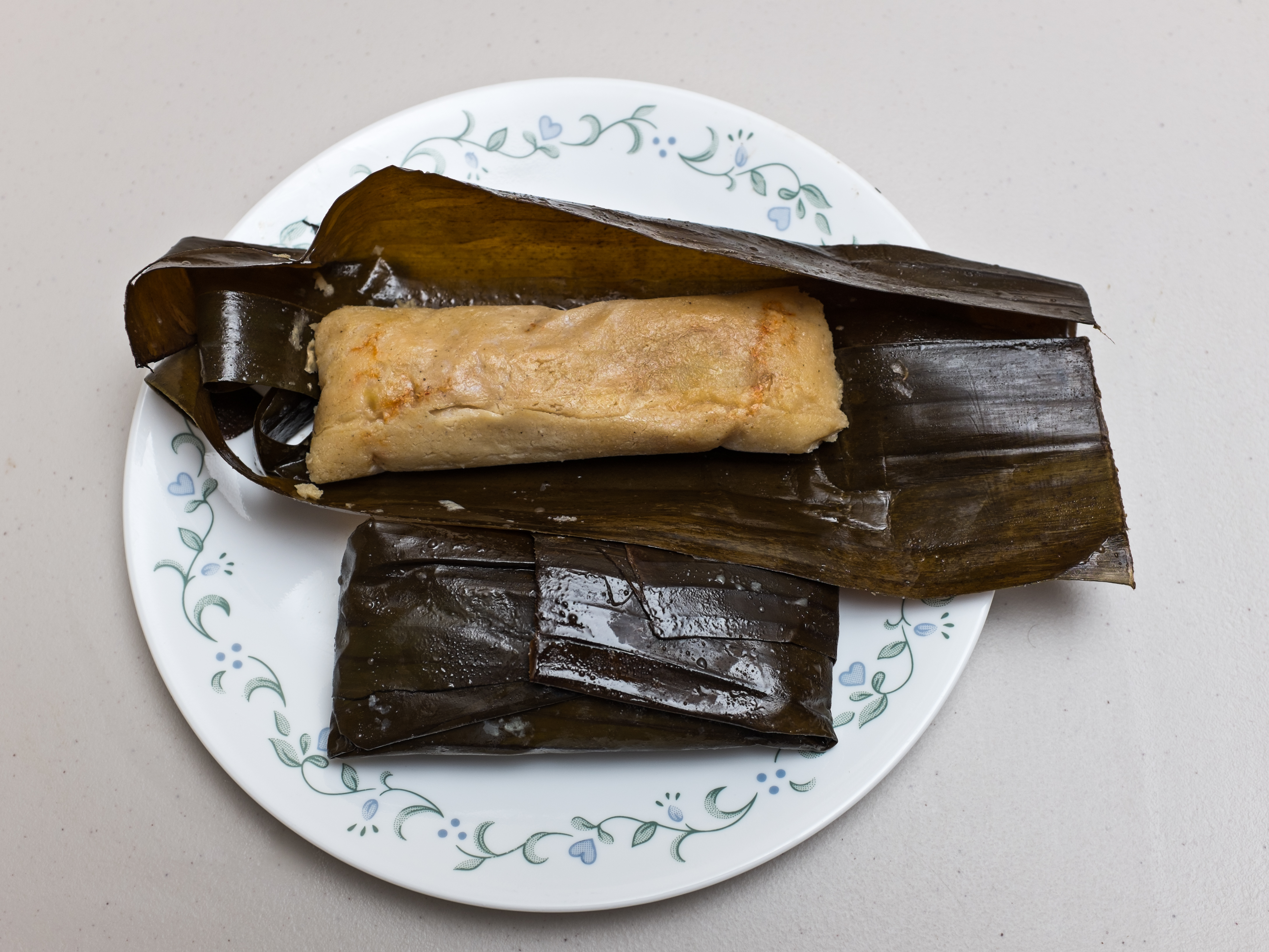 Tamales salvadoreños, uno abierto, otro cerrado